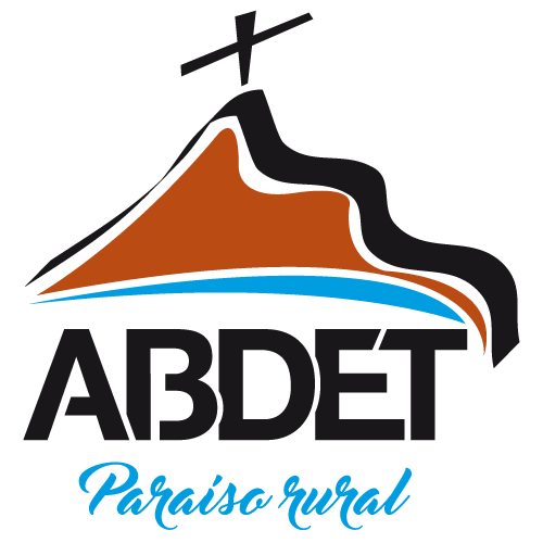 Logo turístico de Abdet. La imagen representa el símbolo de la "creueta del Penyó" y los ríos. El eslogan es "Paraíso rural"